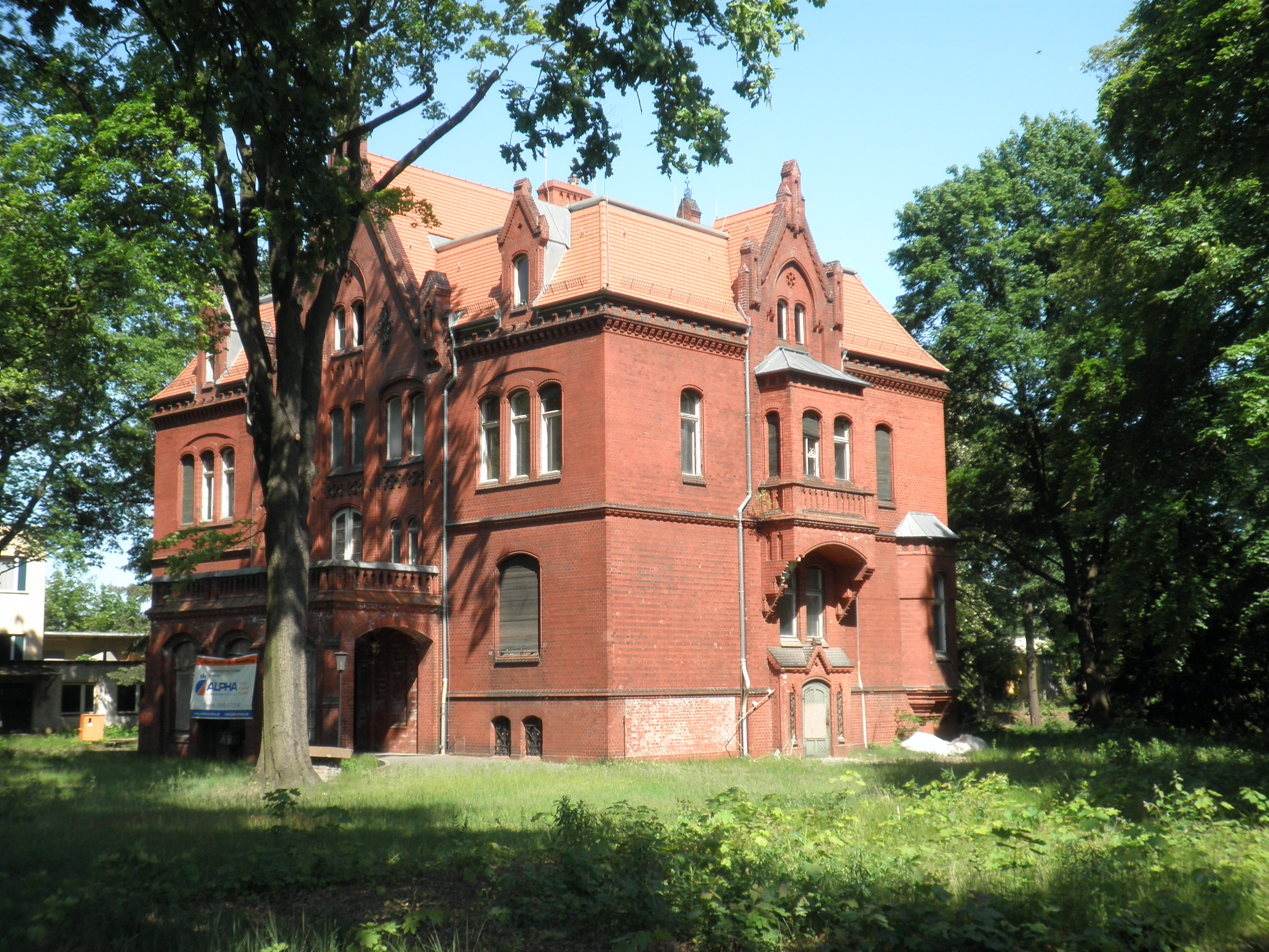 Denkmalgeschützte ehemalige Fabrikantenvilla in der Ewald-Haase-Straße 12 (Cottbus).